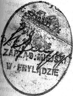 Pieczęć miejska Korfantowa z 1946 r.